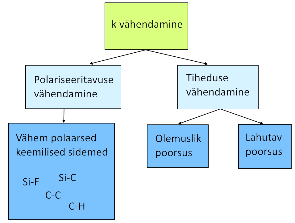 Materjali suhtelise dielektrilise läbitavuse vähendamise valikud